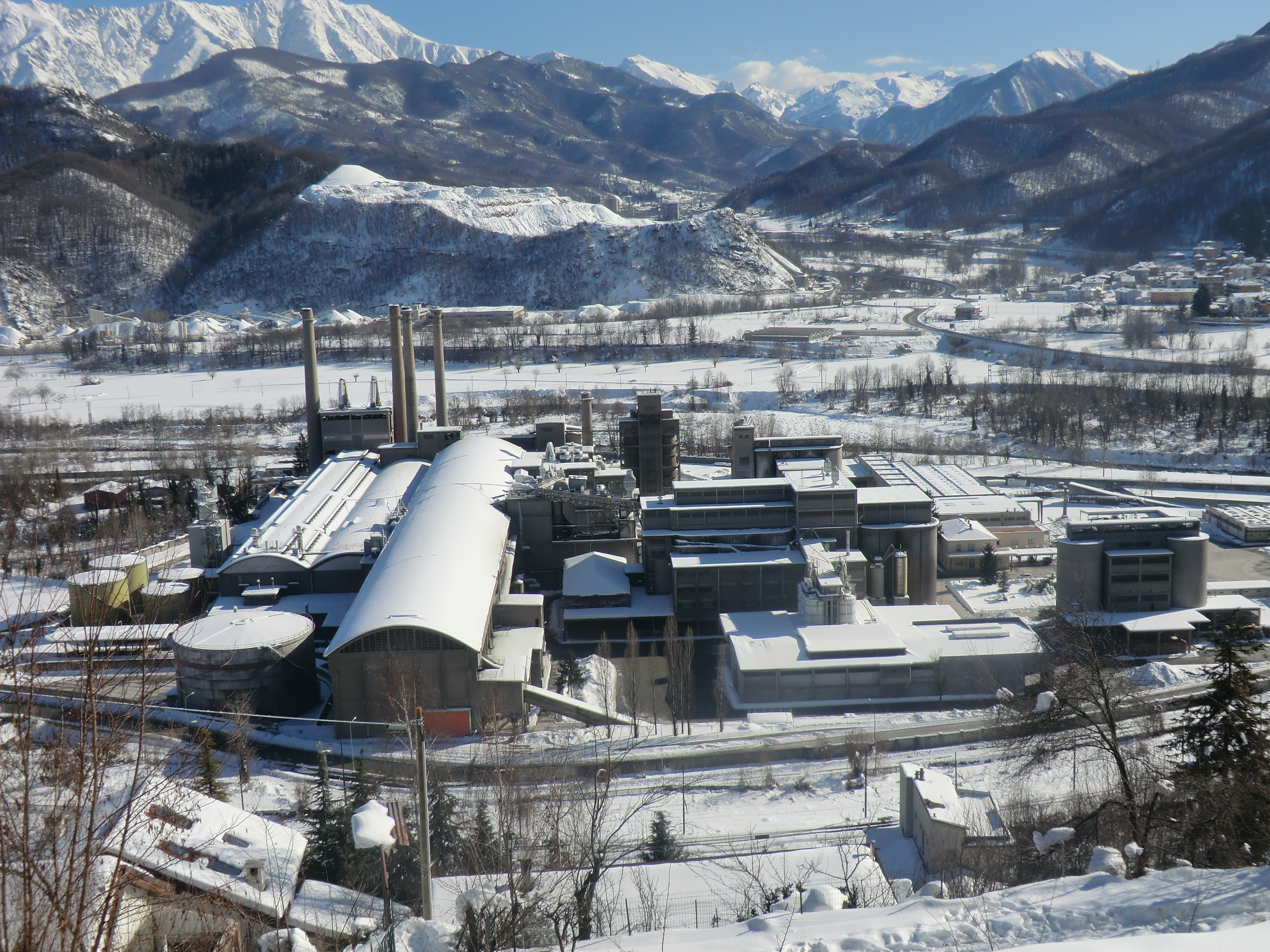 Borgo San Dalmazzo (Cuneo): stabilimenti Italcementi